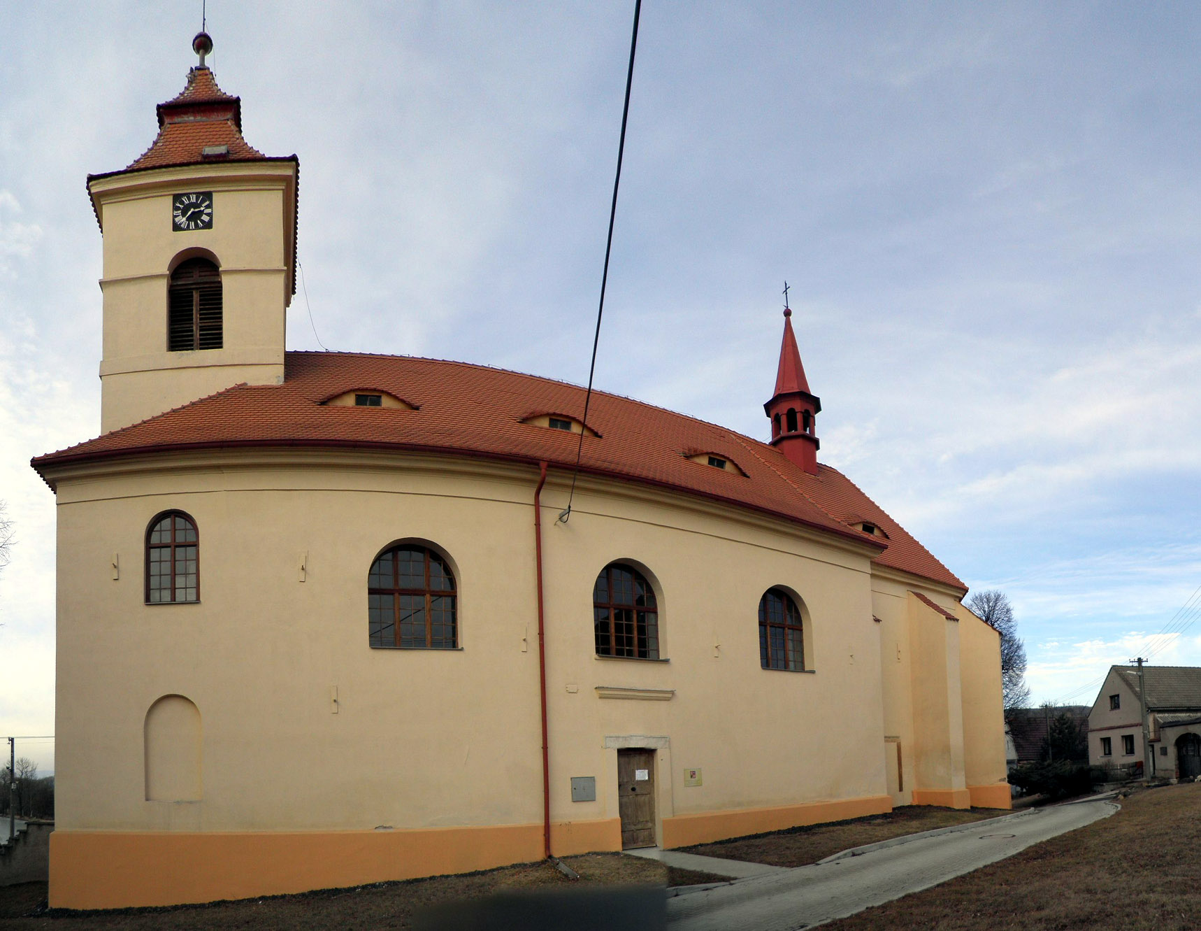 Kostel sv. Stanislava Měrunice, okres Teplice